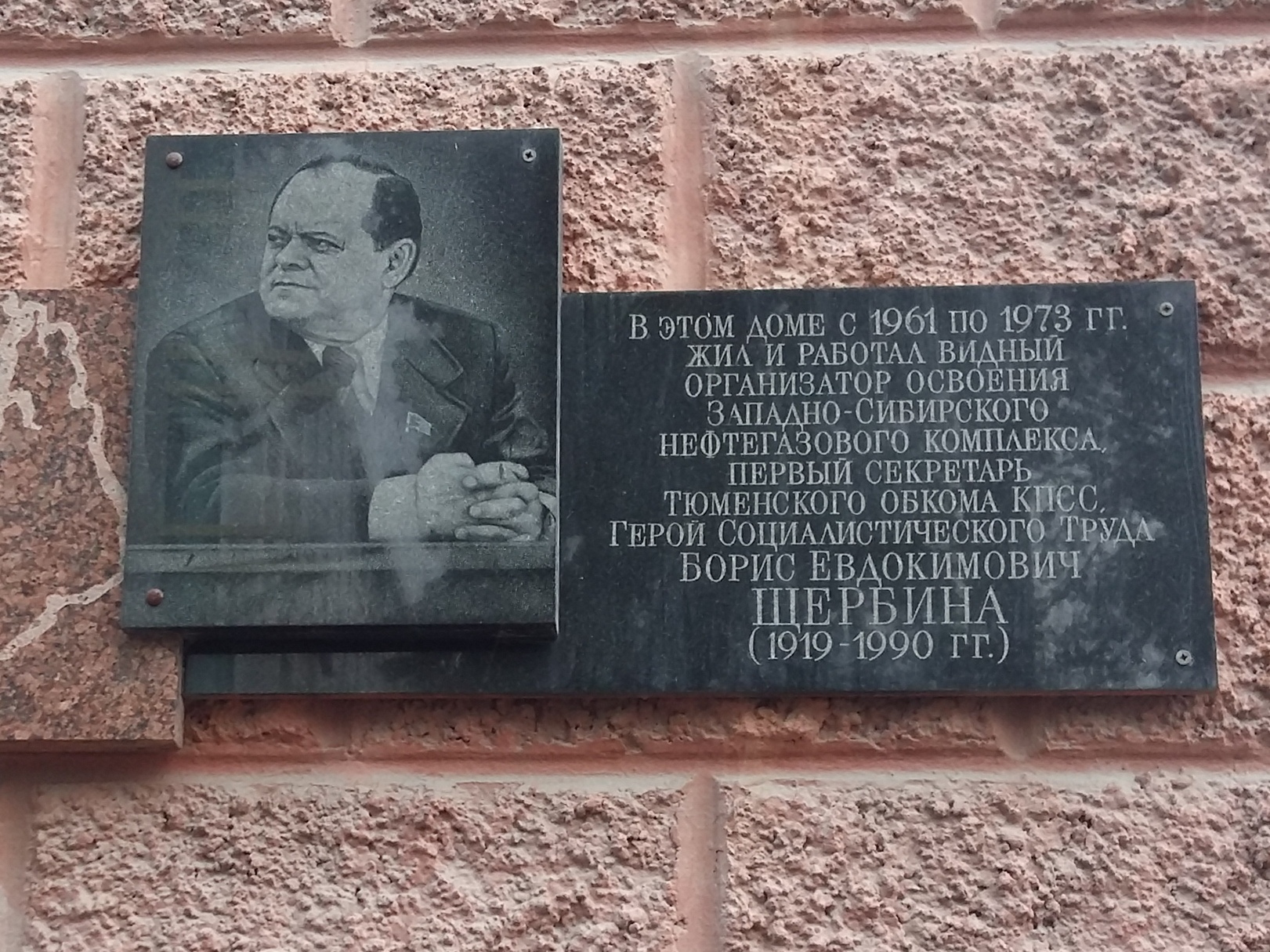 Памятная доска на доме по ул. Хохрякова, 48 в Тюмени, где жил Б. Е. Щербина.